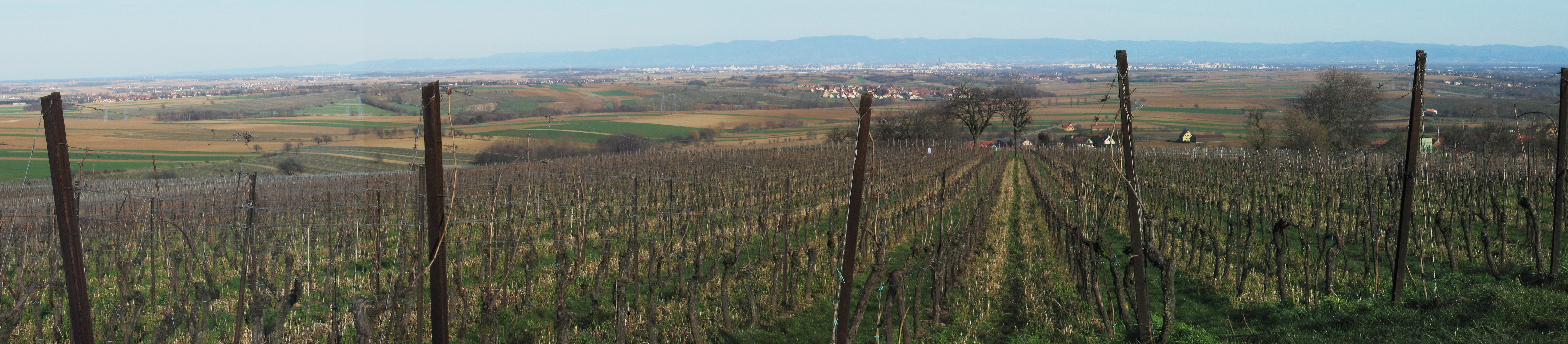 panorama de la plaine d'Alsace, de Strasbourg et de la Forêt Noire pris depuis la colline du Scharrach (Bas-Rhin). Assemblage de 4 clichés